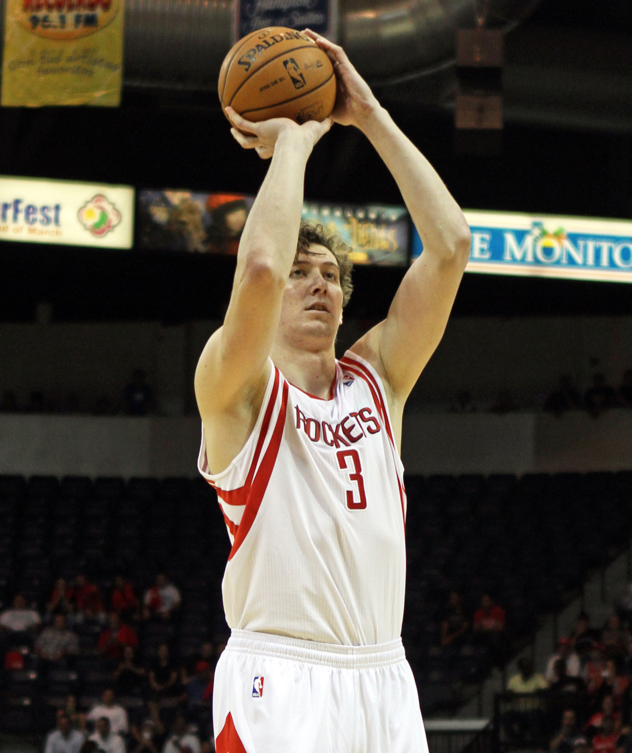 Turkish bball player Omer Asik.